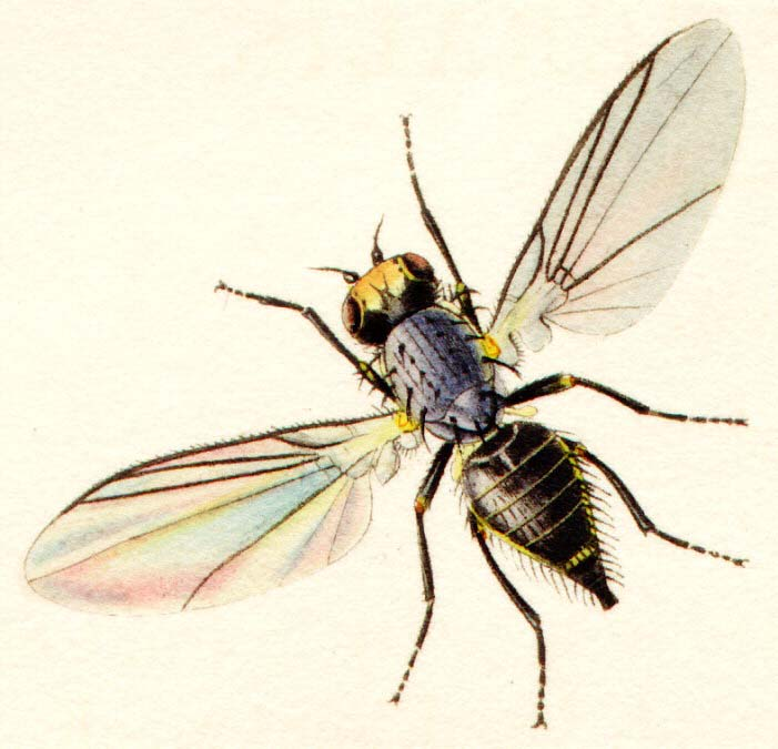 Napomyza lateralis